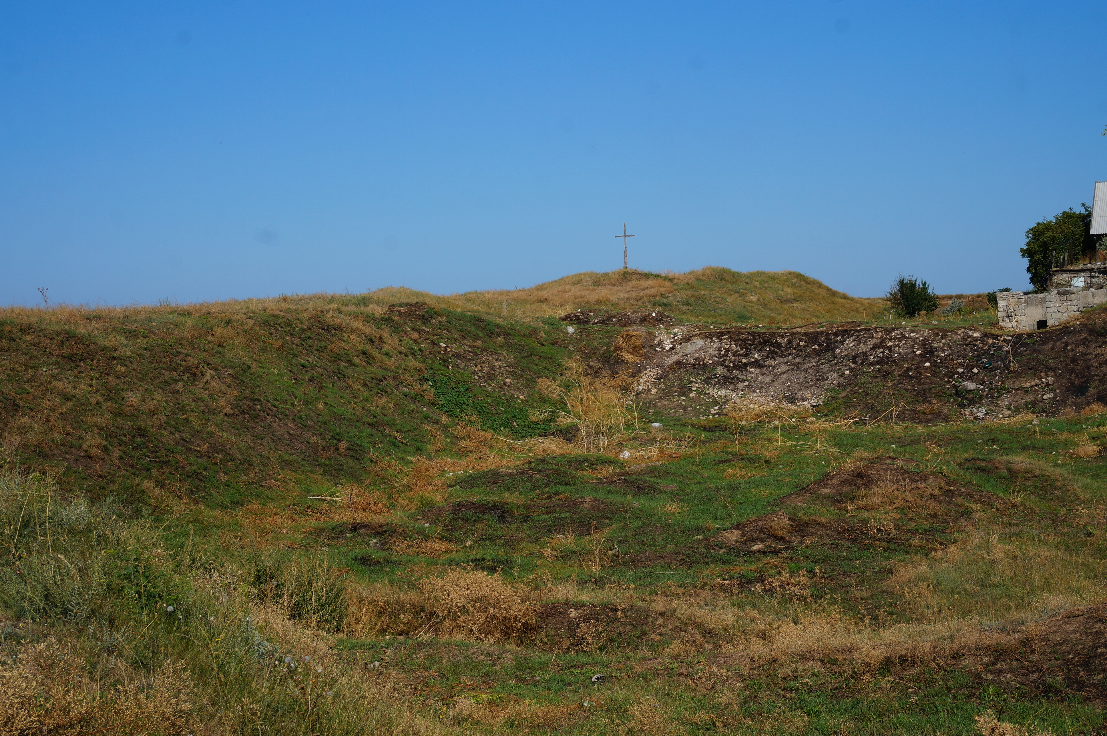 Городище, смт Овідіополь